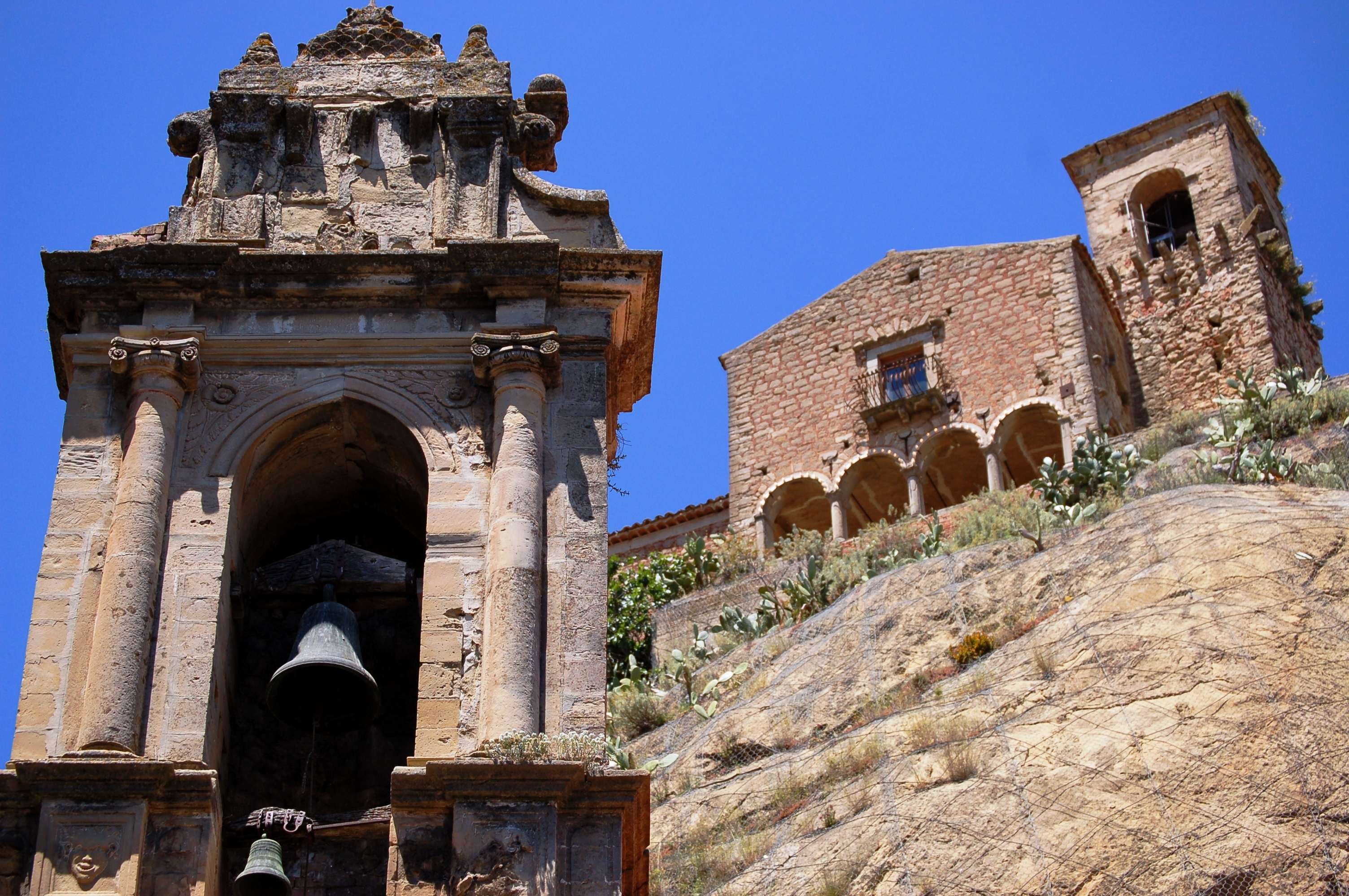 Nicosia (EN), ITA